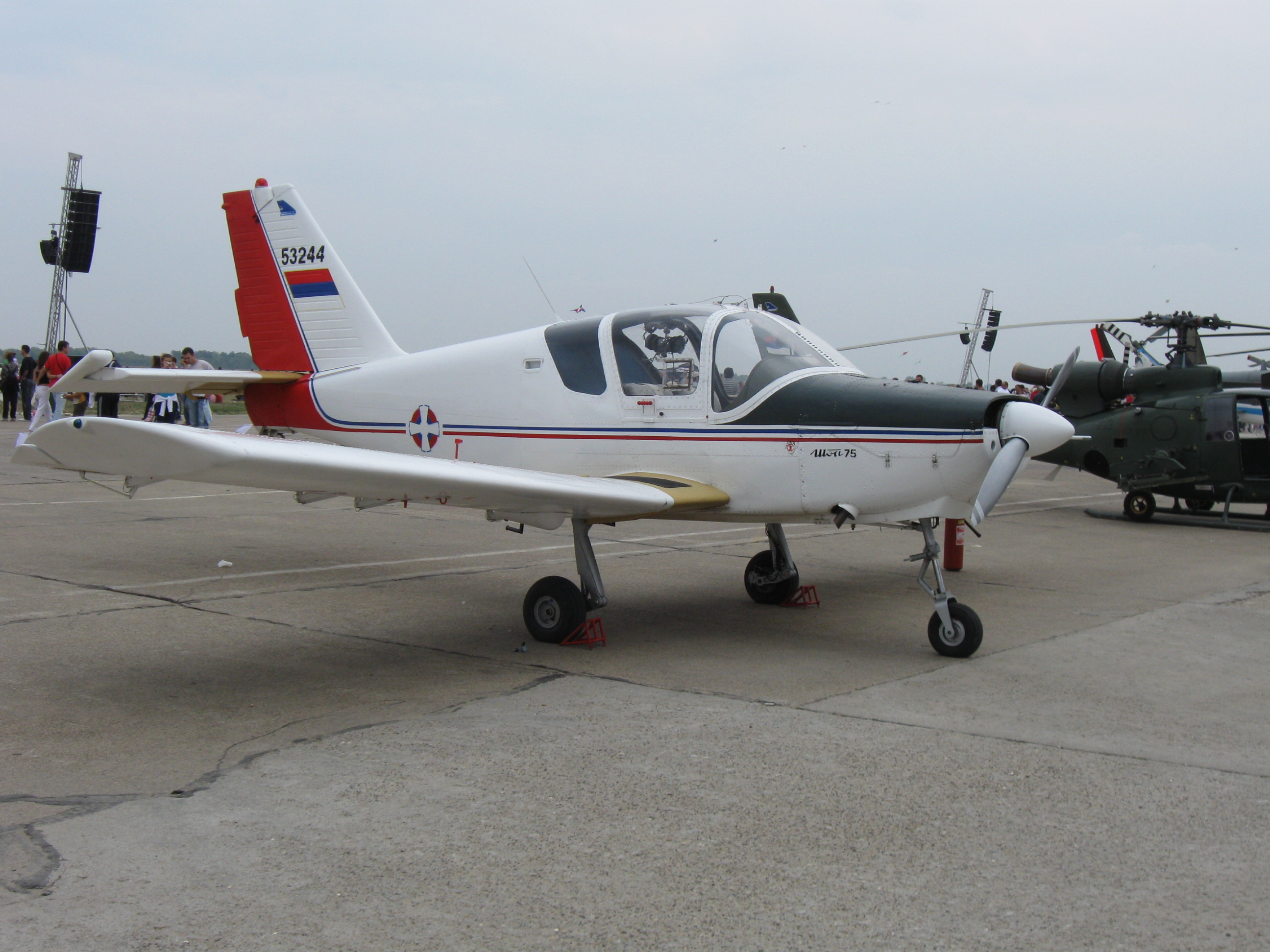 Авион Утва 75, намењена истоименом чланку. Творац слике је SmirnofLeary и предаје је у јавно власништво. Слика је направена 13. септембра 2009. године на аеромитингу у Батајници.